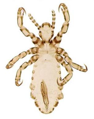 Pediculus schaeffi under a light microscope